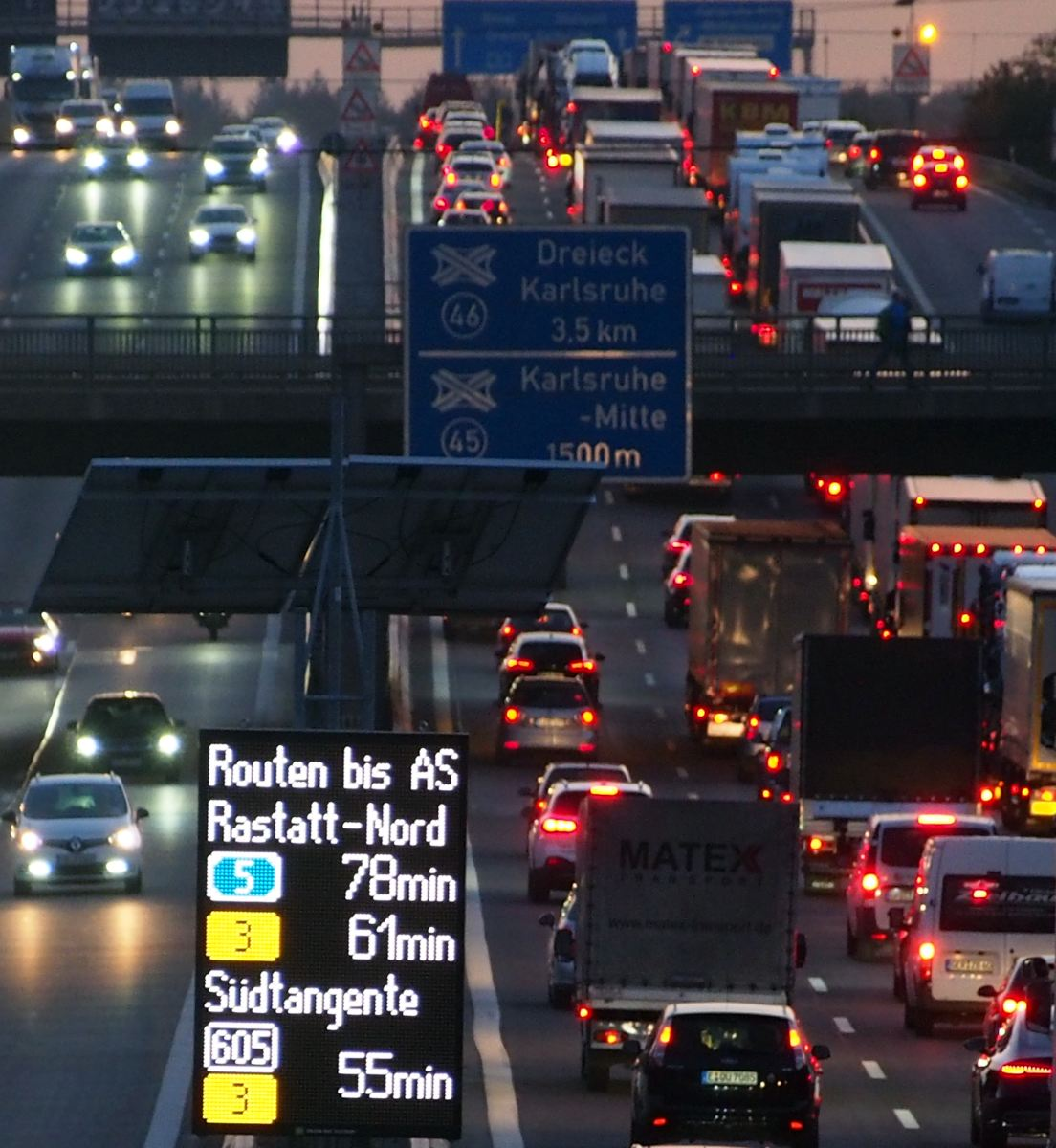 Verkehrsbeeinflussungsanlage vor dem Autobahndreieck Karlsruhe Routen bis AS-Rastatt-Nord A5 78min B3 61min L605+B3 55min